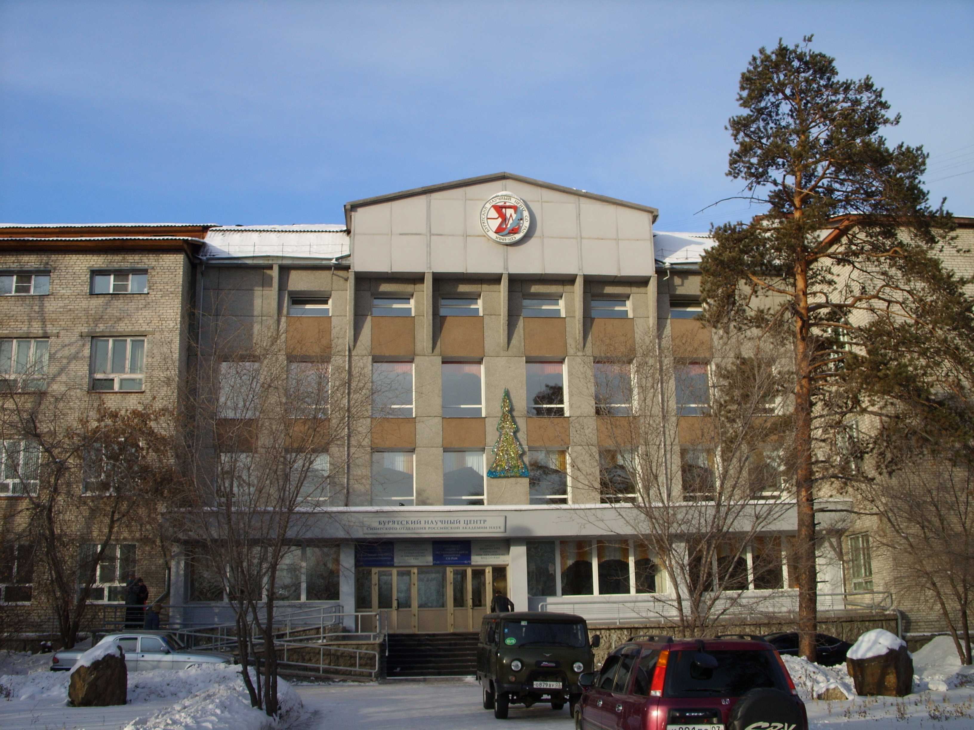 снимки декабря 2008 г.